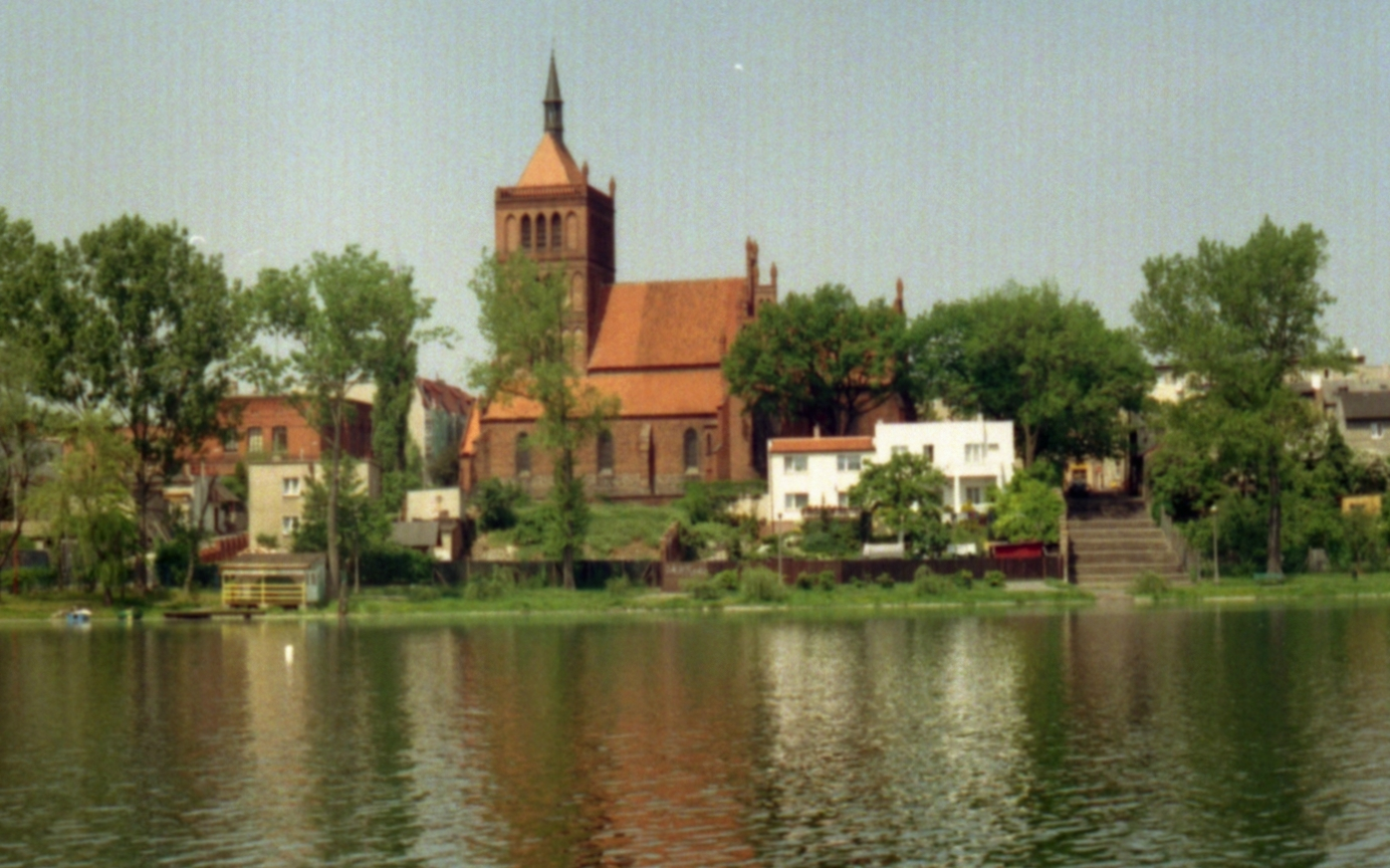 Chełmża, ST NICHOLAS' CHURCH. 2007